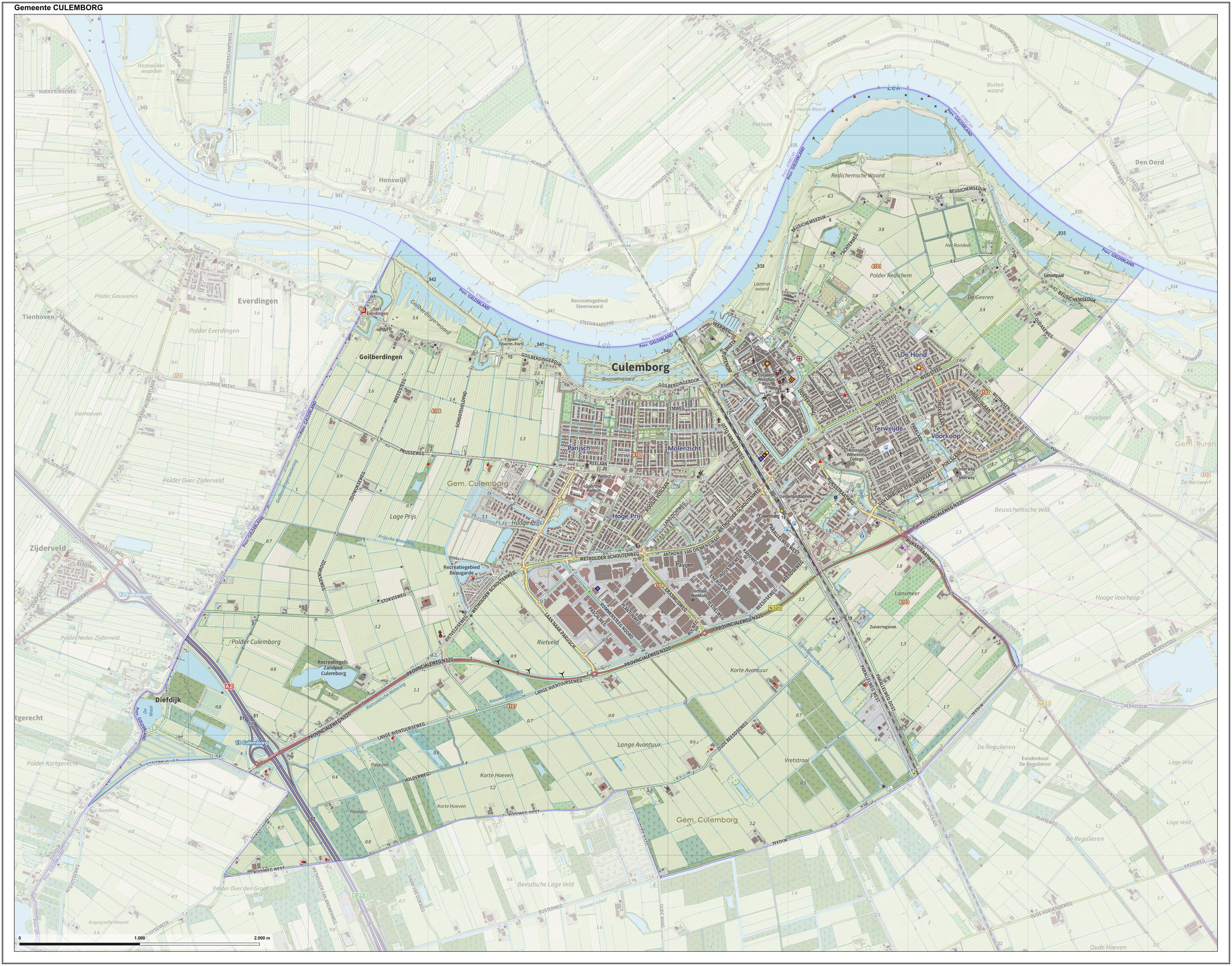 Topografische gemeentekaart. Resolutie: 400 pixels/km. Kaartbeeld samengesteld uit de open geodata van de Top10NL en Top25namen (Kadaster), Creative Commons-BY licentie. Gebouwvlakken uit open geodata BAG extract. Wegen uit de OpenStreetMap, OpenStreetMap community. Reliëfschaduw uit de Actuele Hoogtekaart AHN2. Samenstelling en kleurenschema: Jan-Willem van Aalst, met QGIS. Zie ook de Legenda.